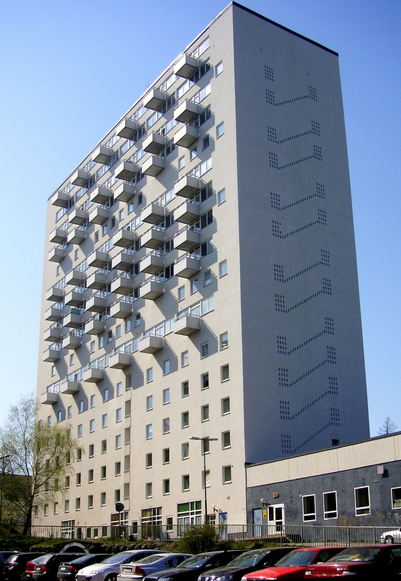 Förort Björkhagen i Stockholm med höghuset Duggregnet 5